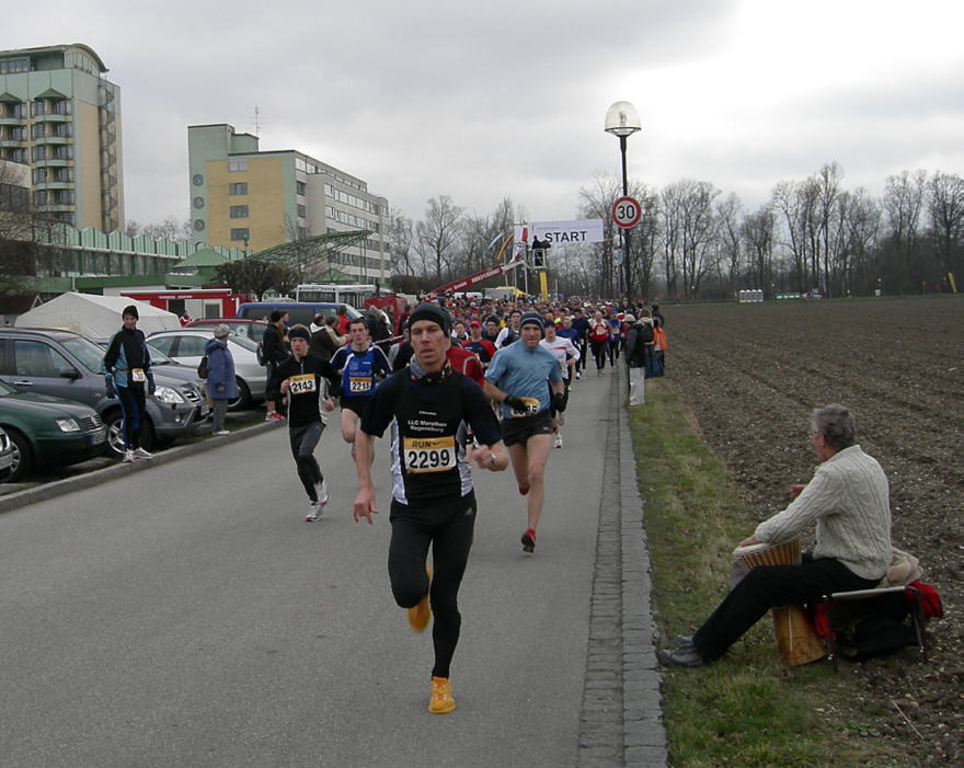 Start der 10 - Kilometerläufer beim Thermen-Marathon 2007.